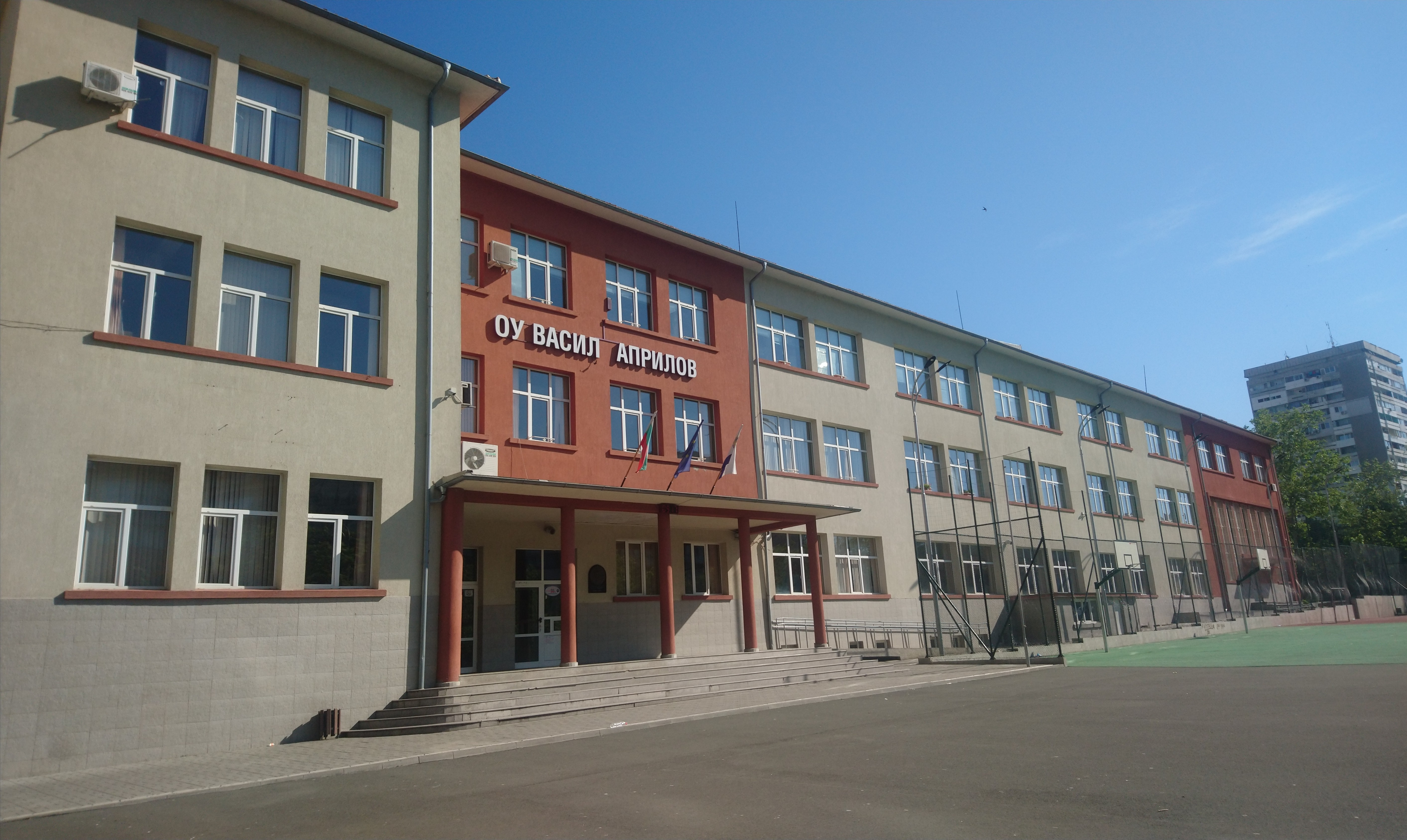 Основно училище Васил Априлов, Бургас